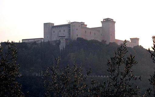 Spoleto (Italy) - La Rocca Albornoz